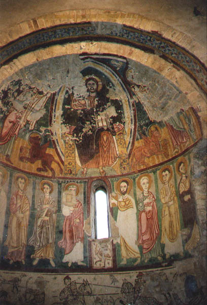 Padova Chiesa San Michele Pozzoveggiani - Affreschi abside: Cristo Pantocrator, Schiera degli apostoli, opera del X-XI secolo.